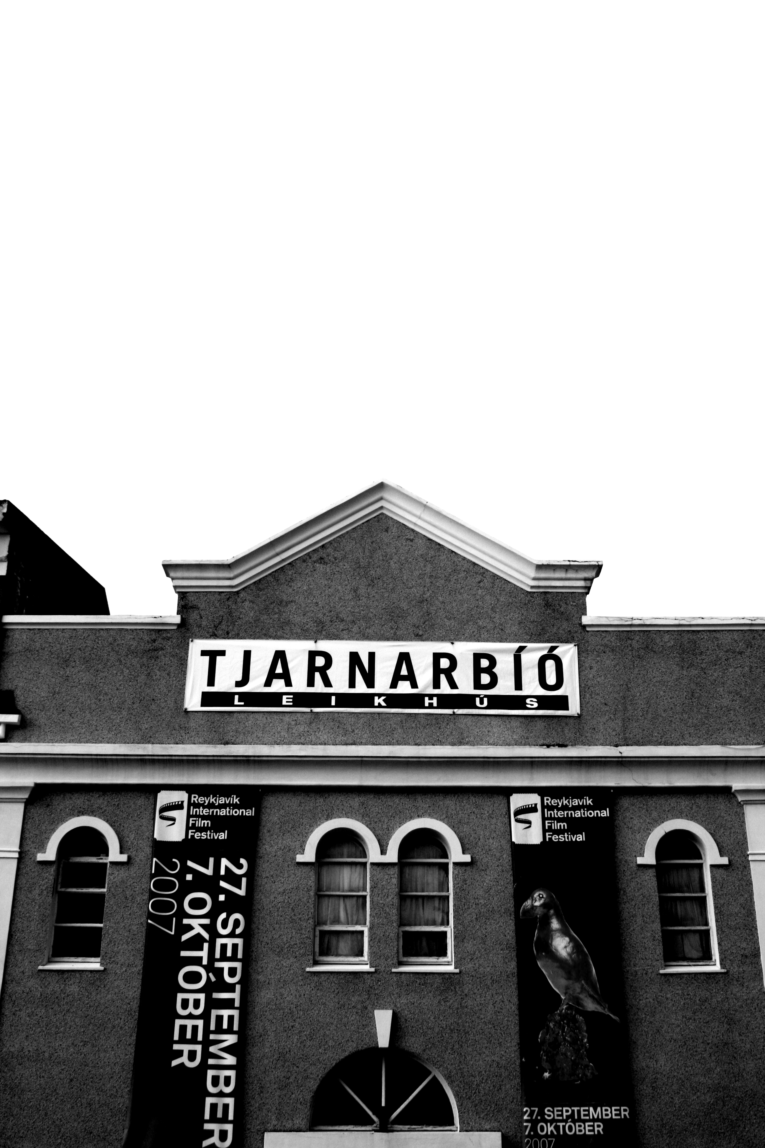 Tjarnarbíó